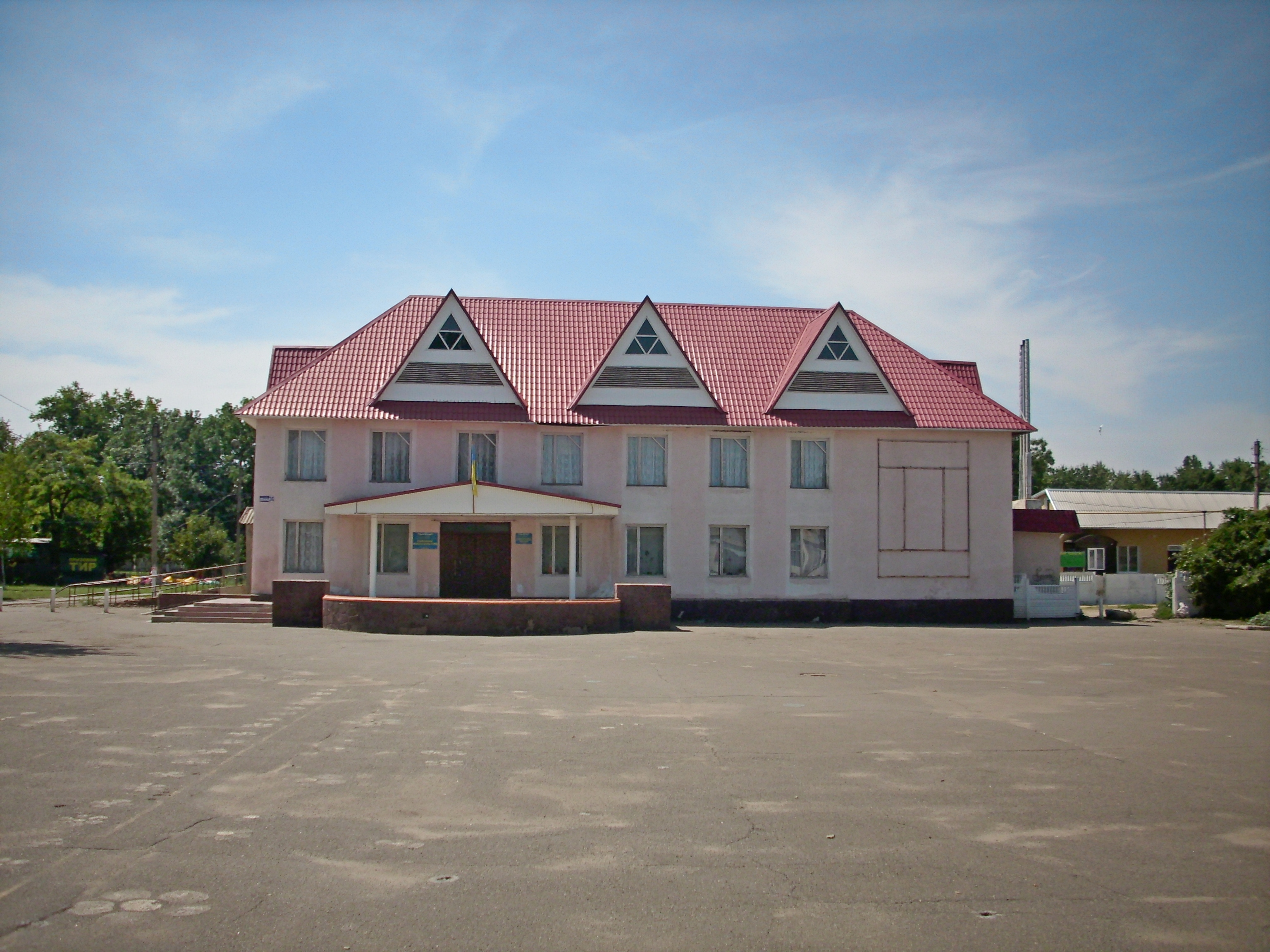 Районний будинок культури